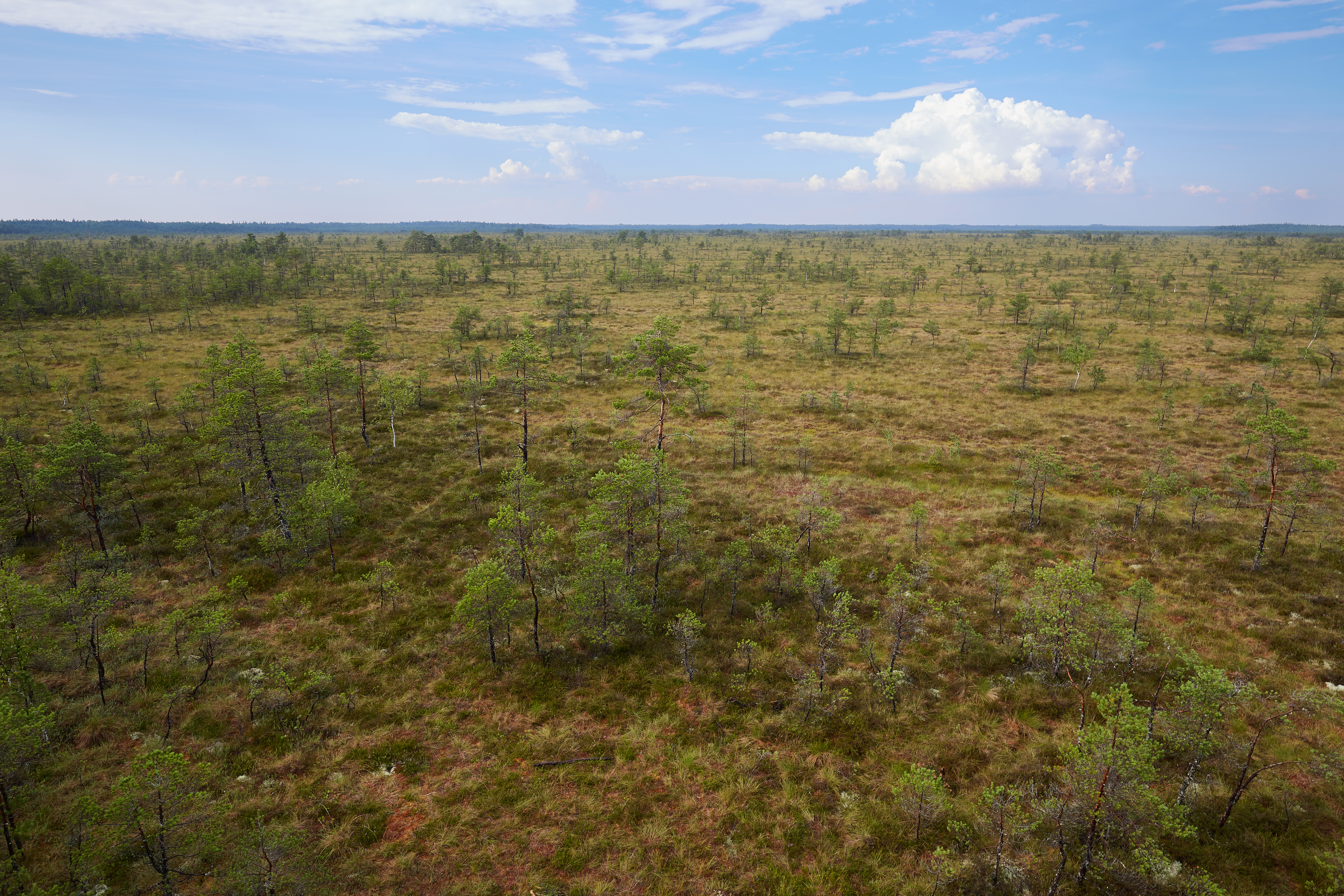 Kaisma hoiuala 2018. aastal